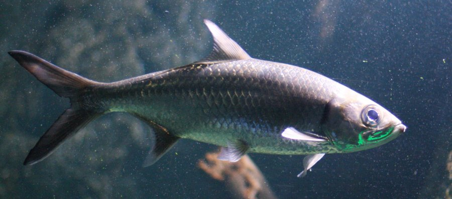 Indo-Pacific tarpon Megalops cyprinoides